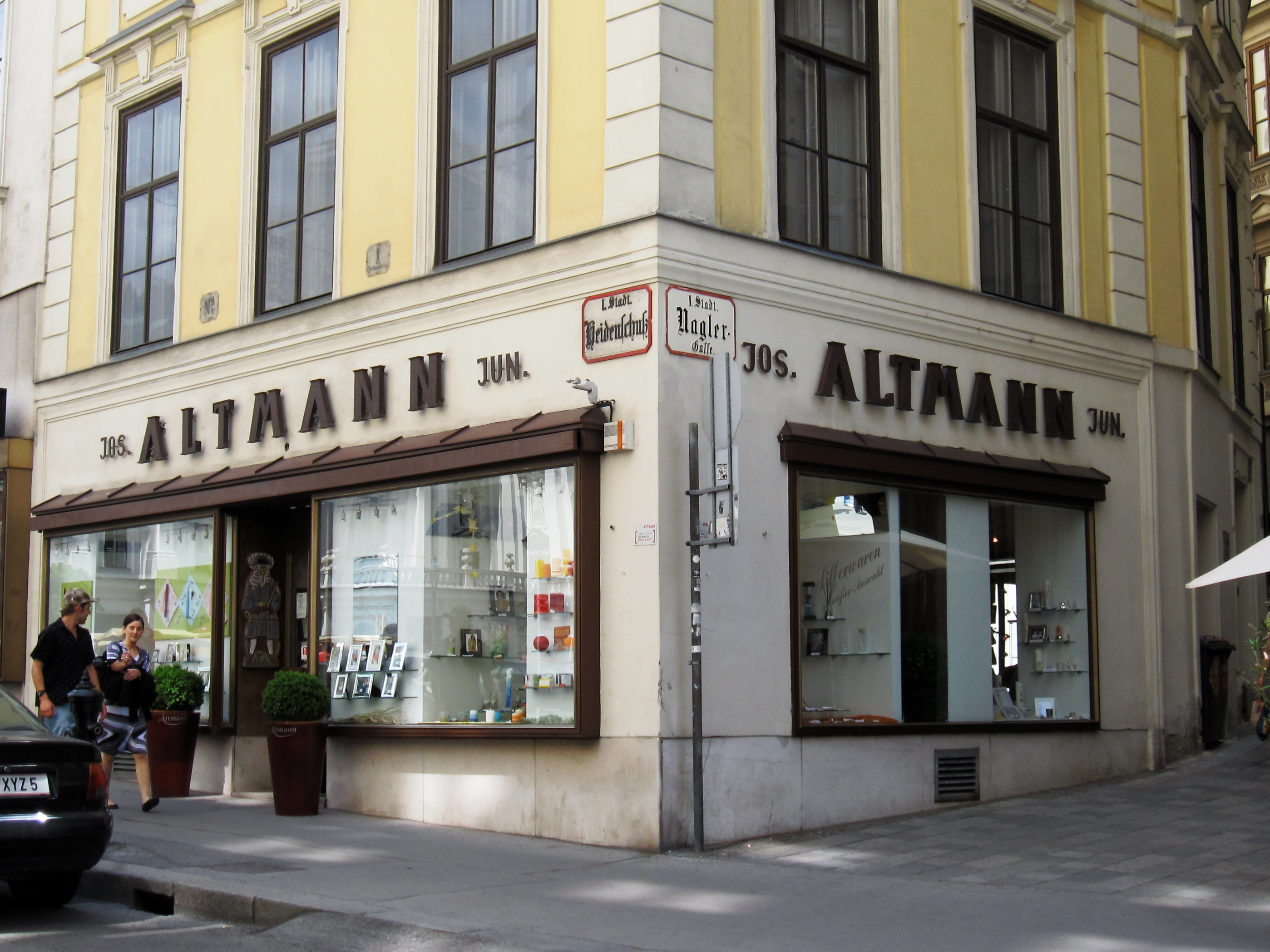 Josef Altmann jun. in Vienna